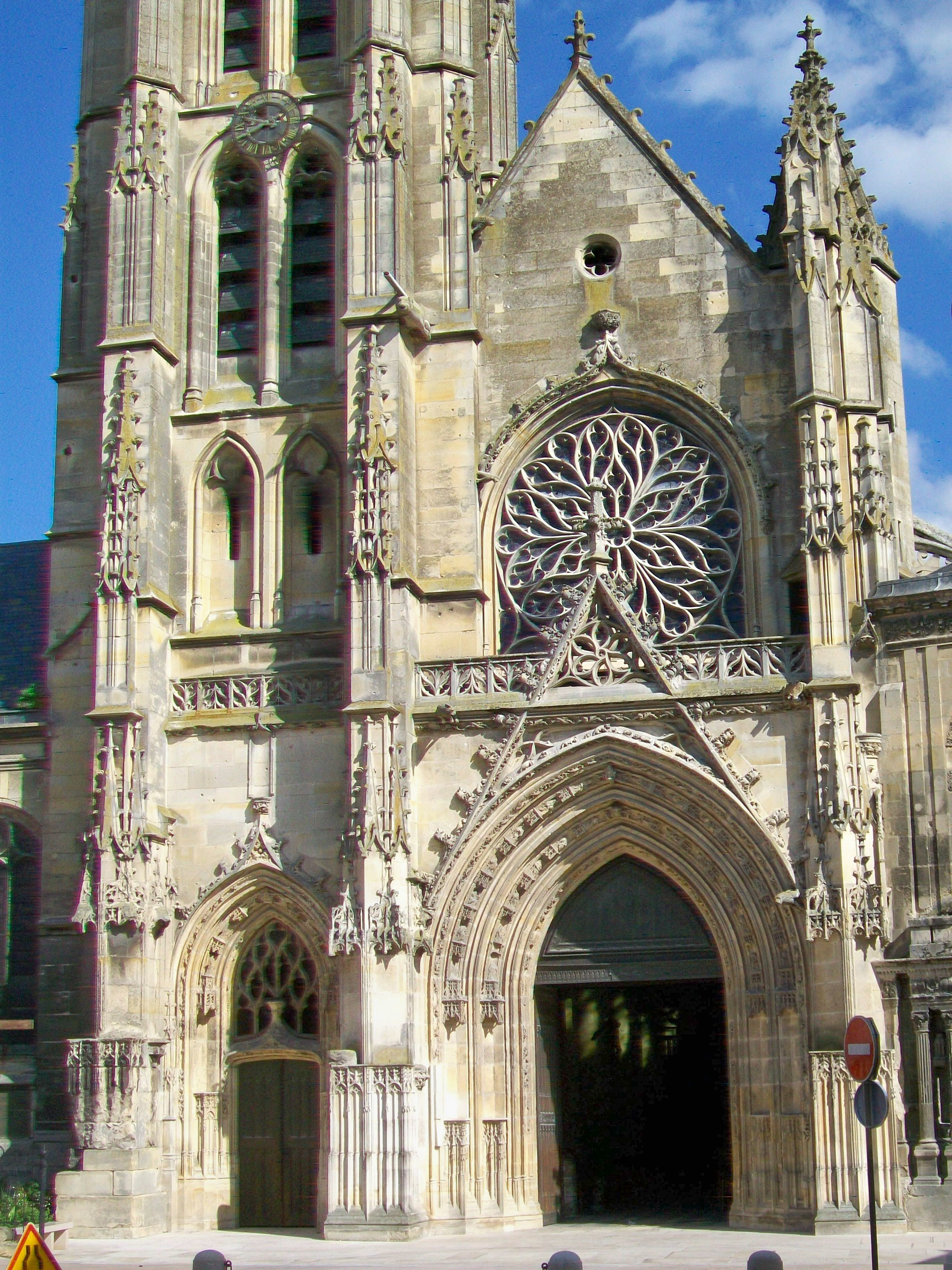 La façade occidentale de la cathédrale Saint-Maclou (détail), depuis la rue de la Coutellerie.